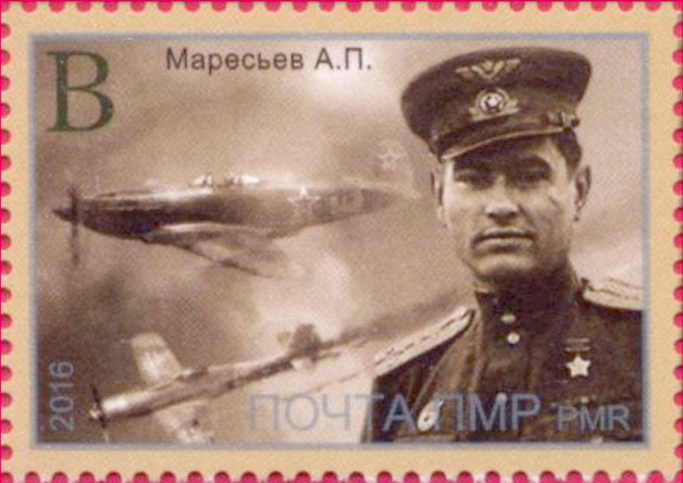 Alexei Maresiev